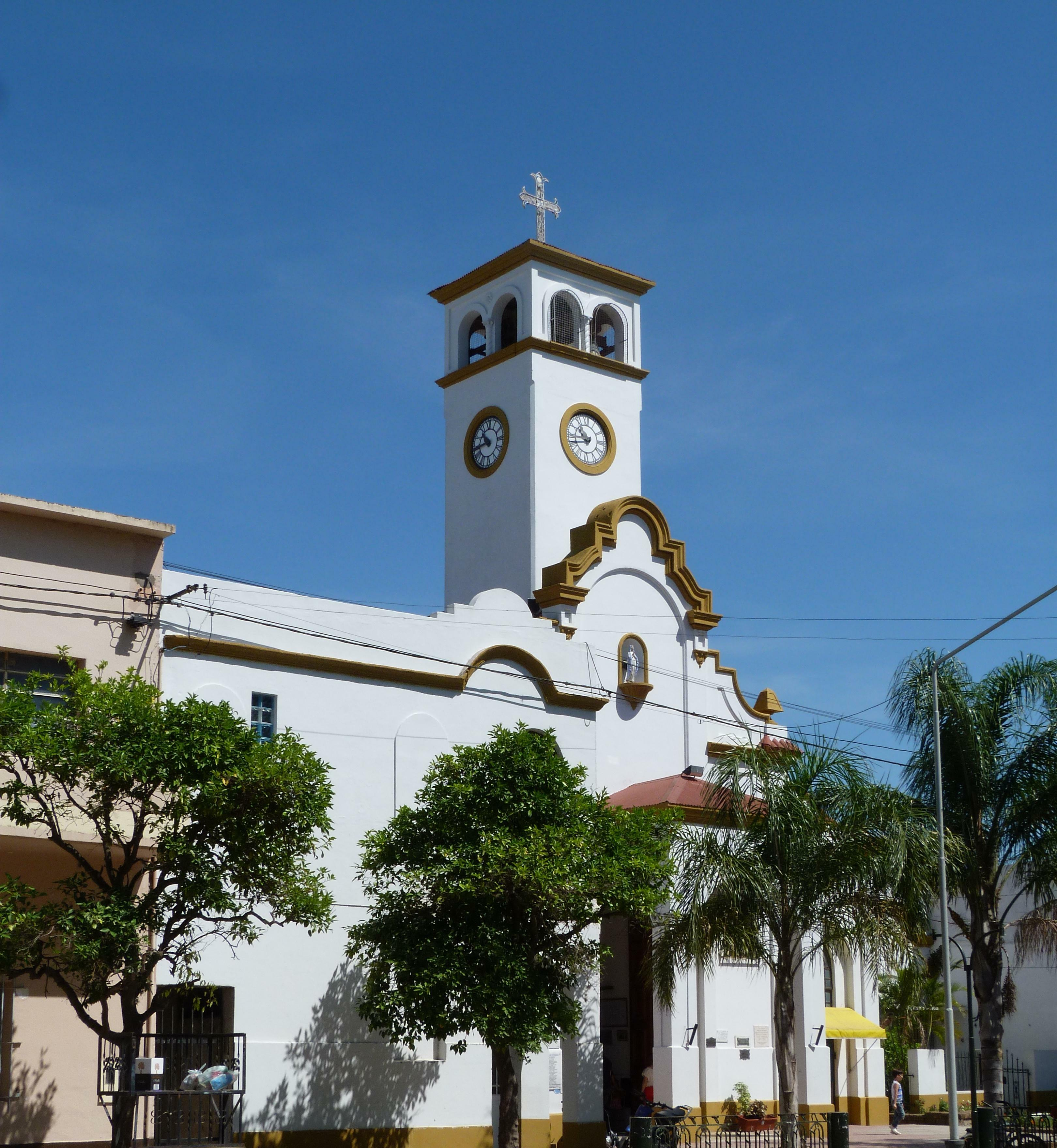 Parroquia Sagrado Corazón de Jesús, Laguna Paiva